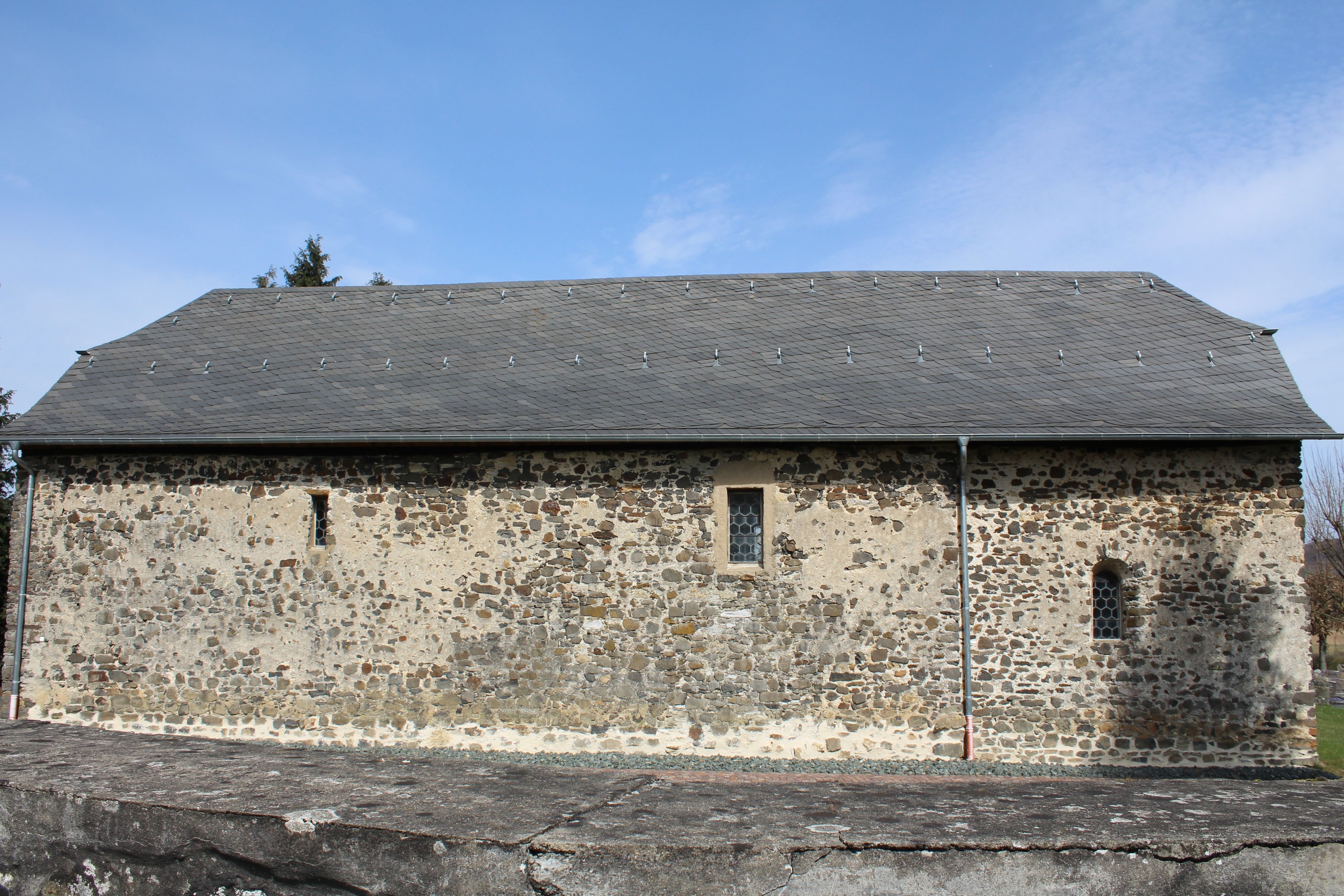 St. Jakobus Merenberg, Landkreis Limburg-Weilburg, Hessen, Deutschland